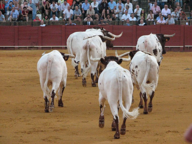 Corrida en la Maestranza sevillana